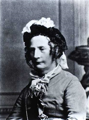 Severine Andrea Casse (1805- 1898)